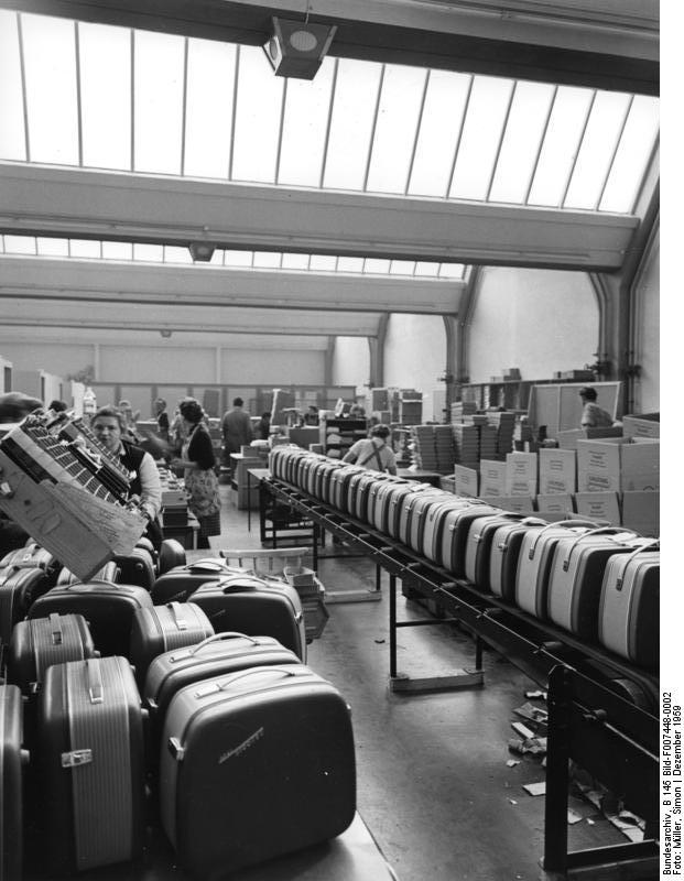 Nürnberg Grundig Radio-Werke Verpacken der fertigen Tonbandkoffer im Werk Bayreuth.